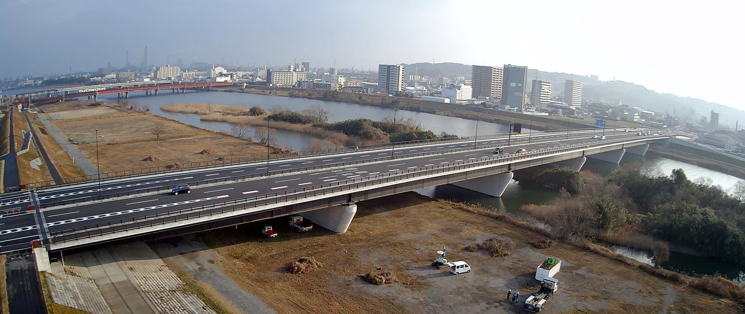 大分川にかかる宗麟大橋